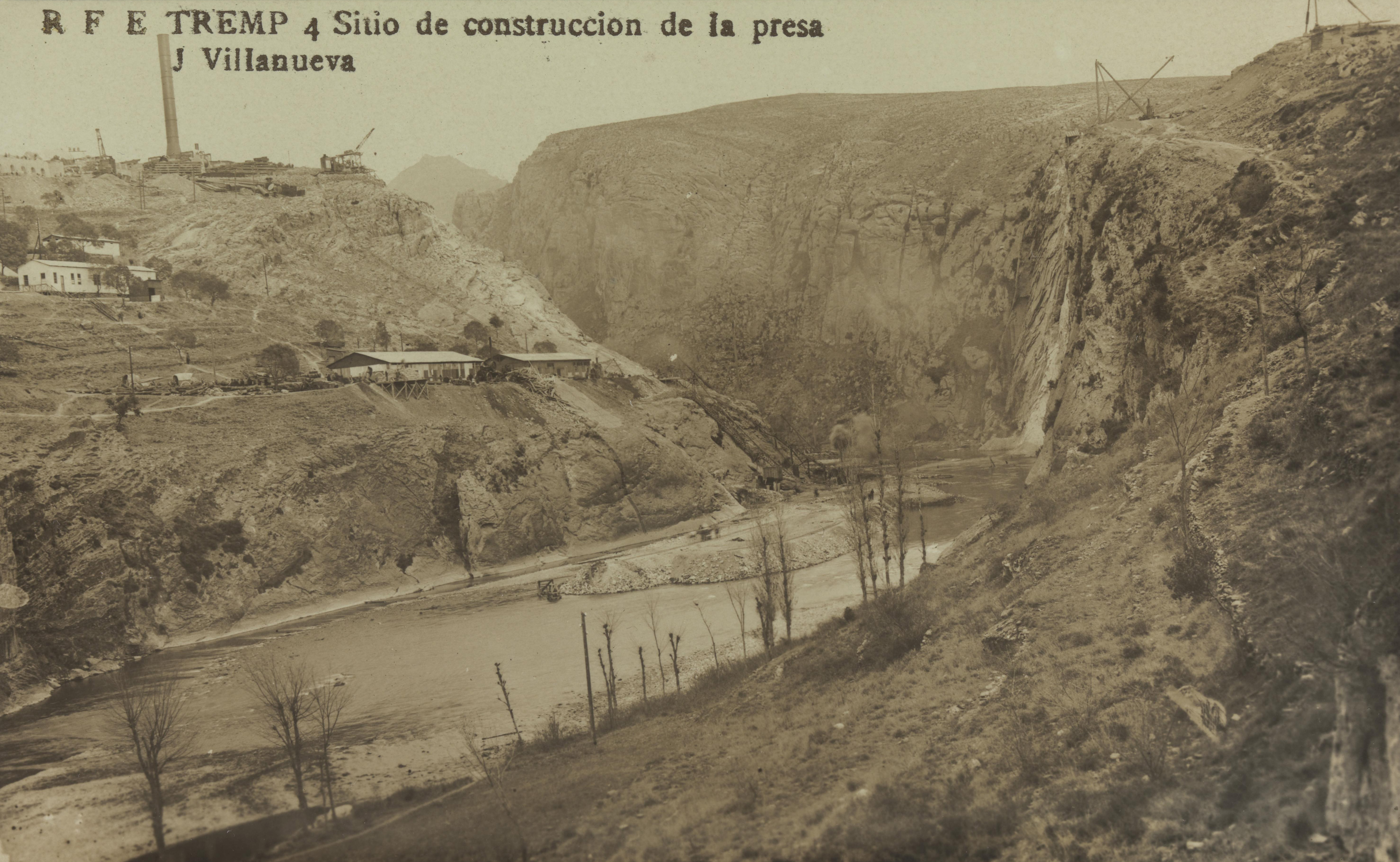 Congost de Susterris, al Noguera Pallaresa, on es construïa la presa de la central hidroelèctrica de Talarn